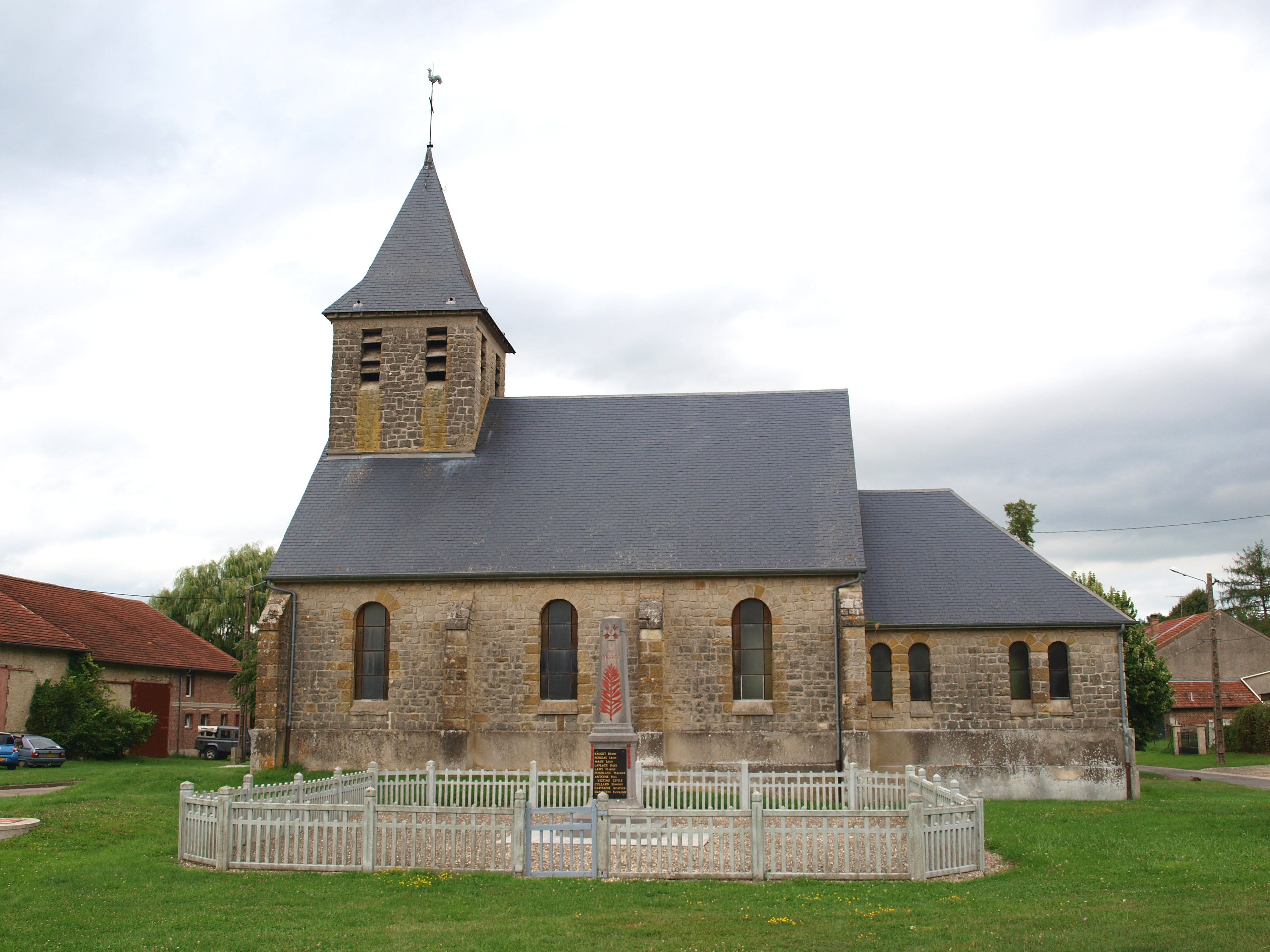 Chevières (Ardennes, France) ; église & monument aux morts.